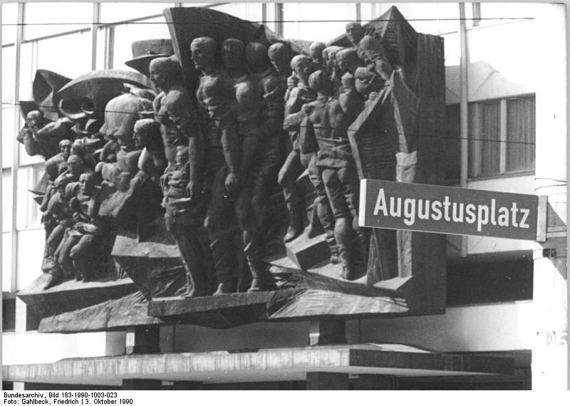 ADN-Friedrich Gahlbeck-3.10.90 Leipzig: Augustusplatz heißt ab 3.10. wieder der Platz vor der Leipziger Universität. Die Stadtverordnentenversammlung hatte den Beschluß zur Umbenennung des Karl-Marx-Platzes am Vortag gefaßt. Im Hintergrund das Bronzerelief Der Leninismus-Marxismus unserer Epoche am Hauptgebäude der Universität.